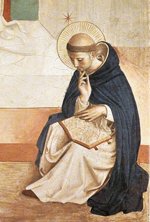 Fragment fresku z klasztoru San Marco we Florencji, przedstawiający św. Dominika